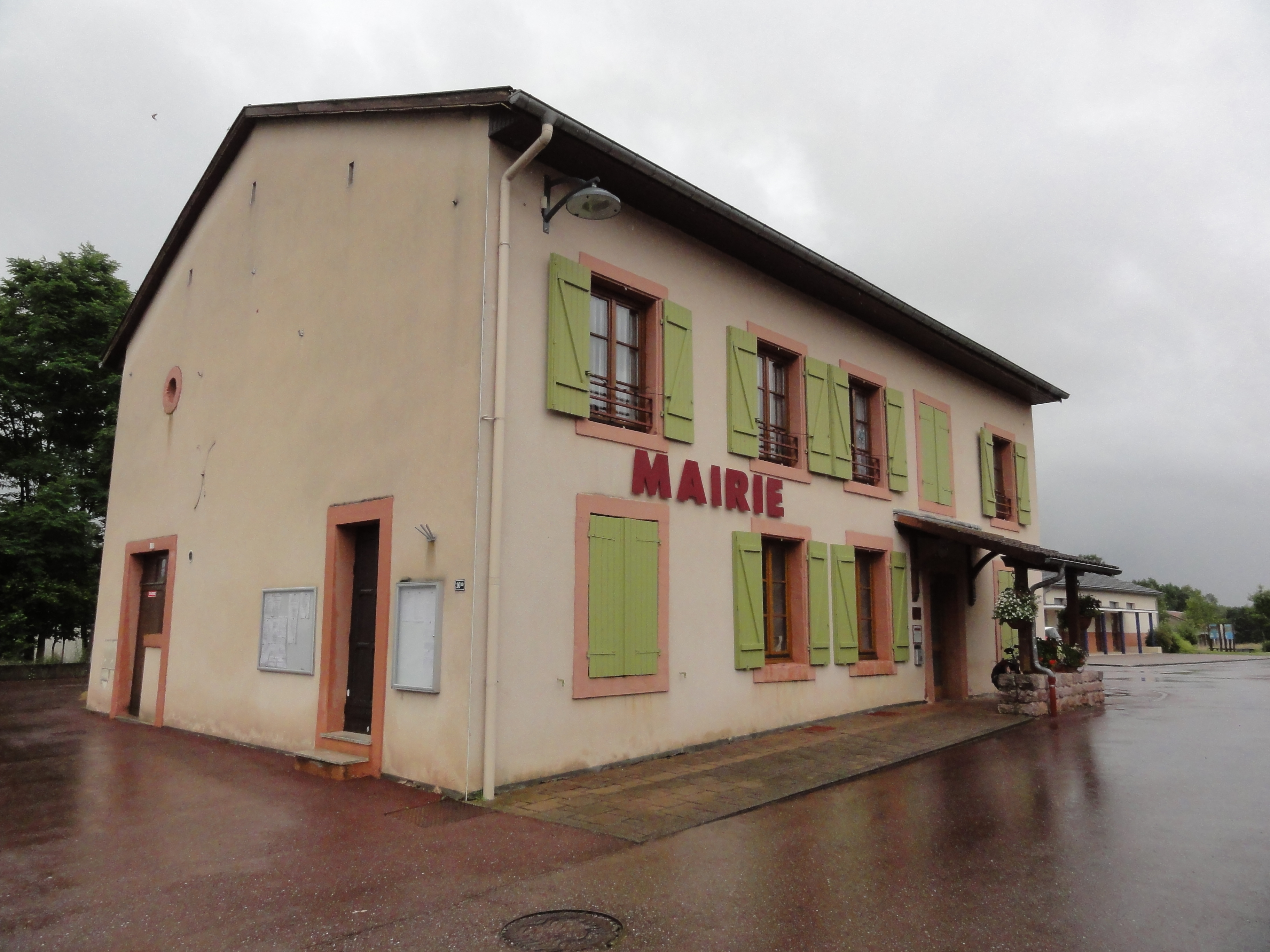 Lachapelle (M-et-M) mairie